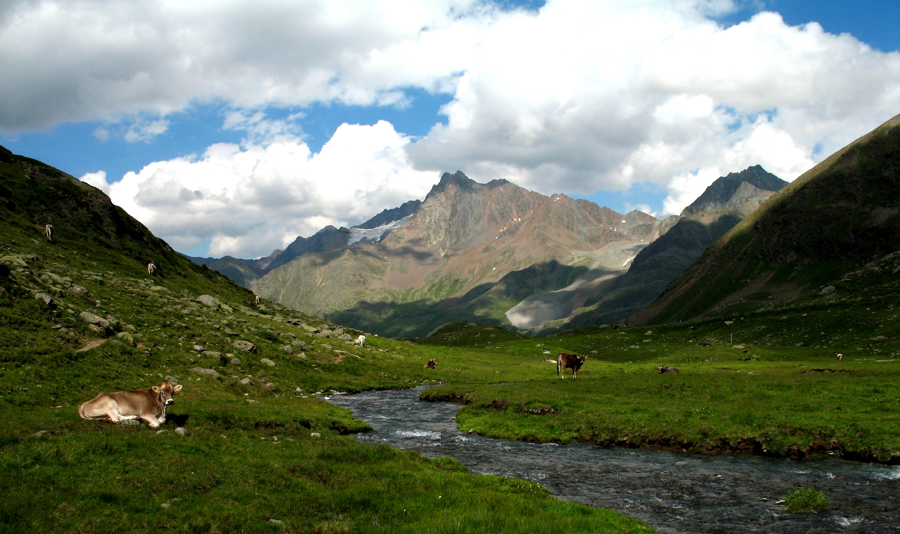 Vordere Ölgrubenspitze, Kaunergrat, Ötztaler Alpen, Tirol